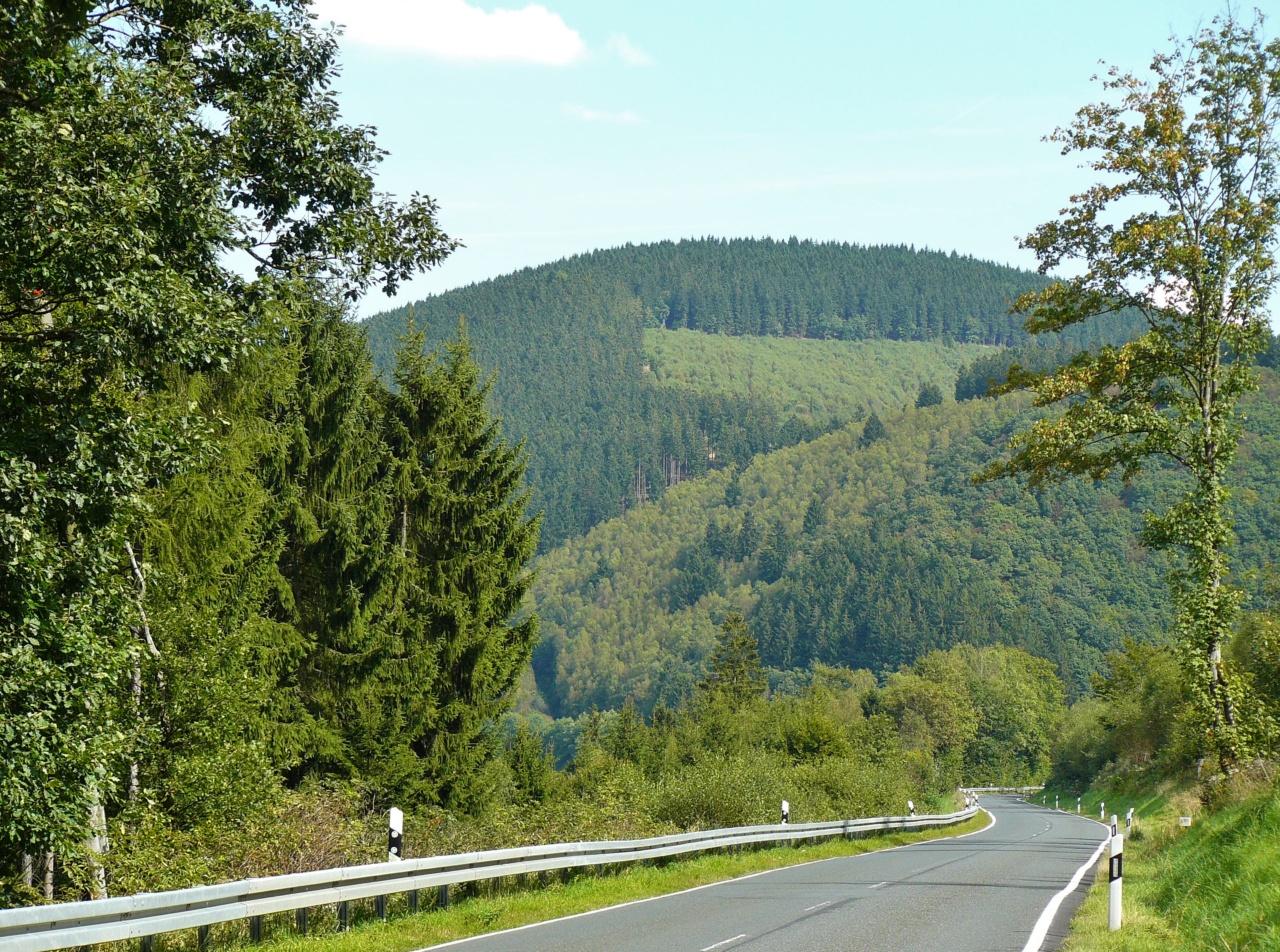 Der Eichholzkopf • Blick aus Westen von der Straße Hainchen - Rittershausen • Δ = 2,2 km; mrel = 2,3